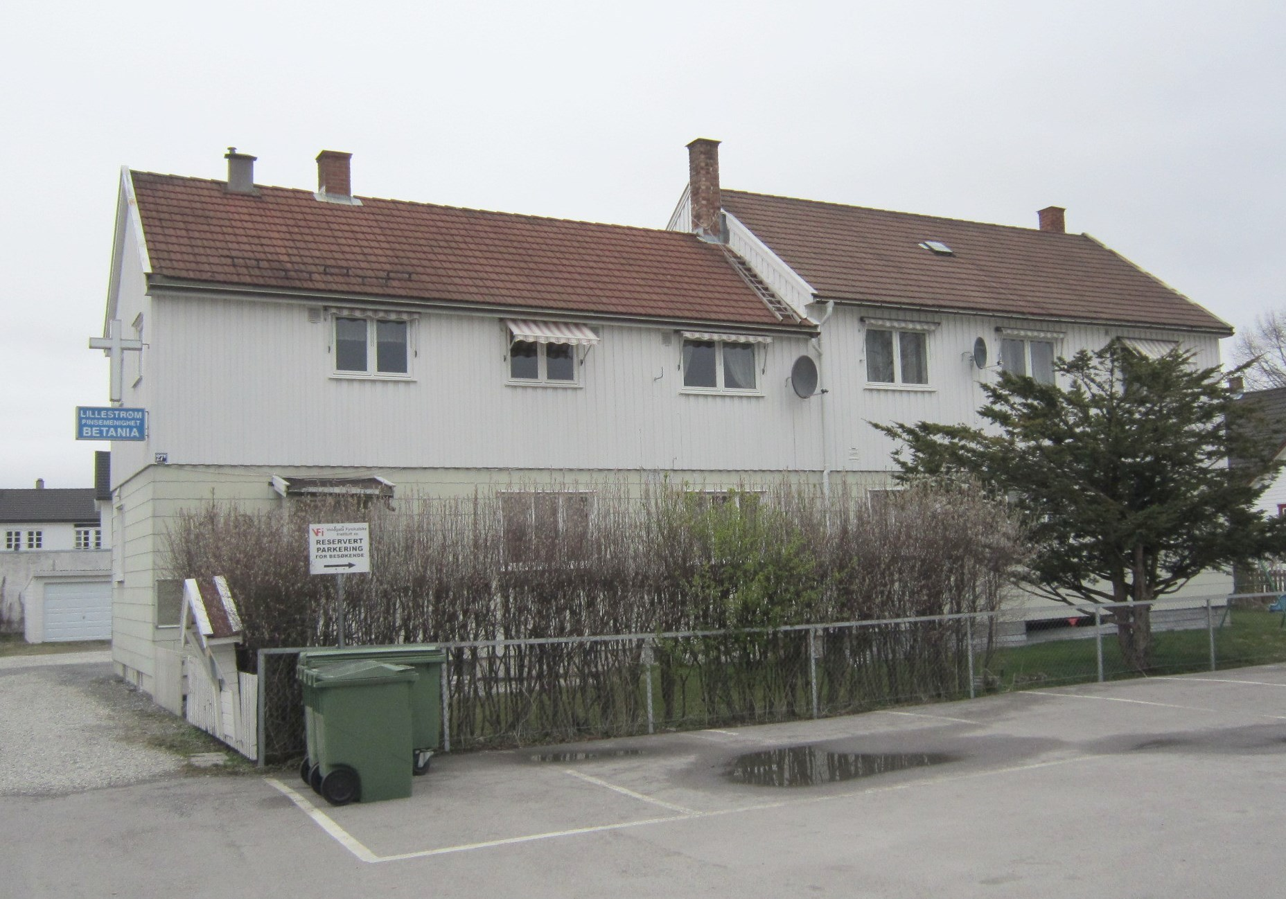 Betania, tilholdssted for Lillestrøm pinsemenighet